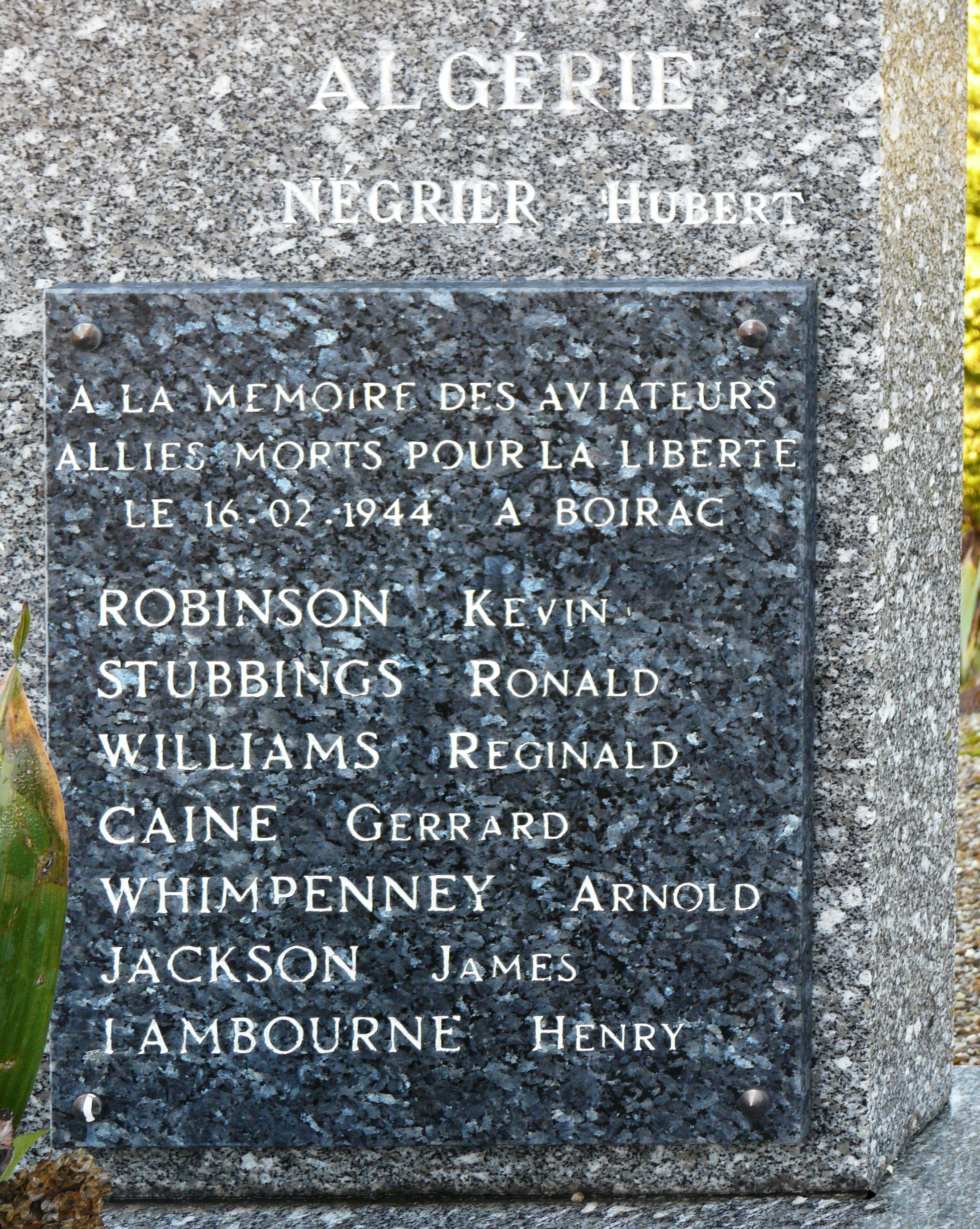 Détail du monument aux morts situé à Bordas, Grun-Bordas, Dordogne, France. Le lieu-dit Boirac se trouve en fait sur la commune voisine de Vergt, à environ 3 km au sud-est de Bordas.